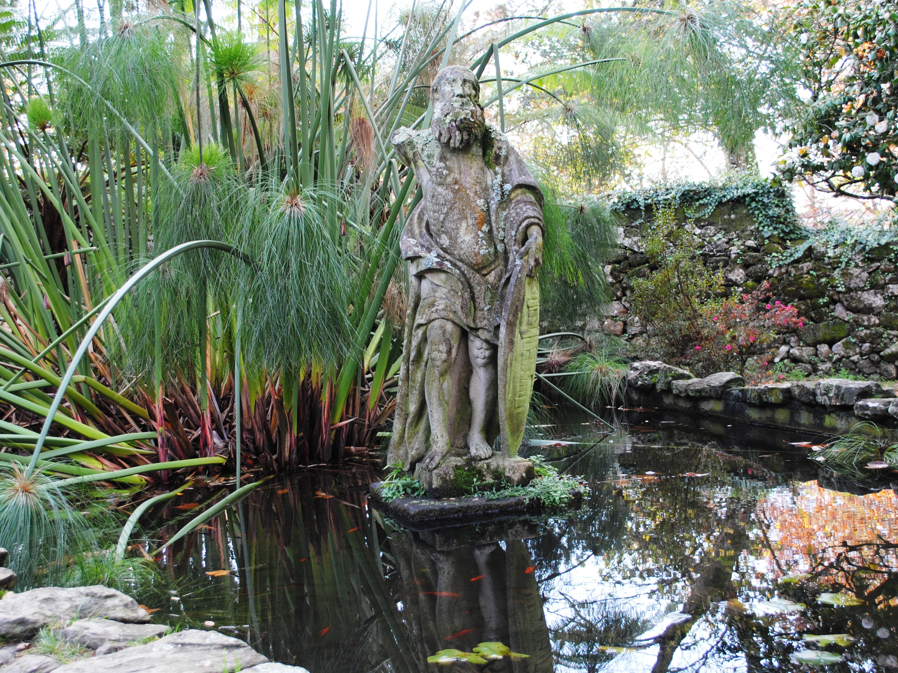 SE REEDIFICOEN EL REINADO DEL CATOLICOMONARCA PHELIPE VY SE REMOVIO A EXPENSASDE LOS PROPIOS ARBITRIOSEN EL AÑO DE 1795